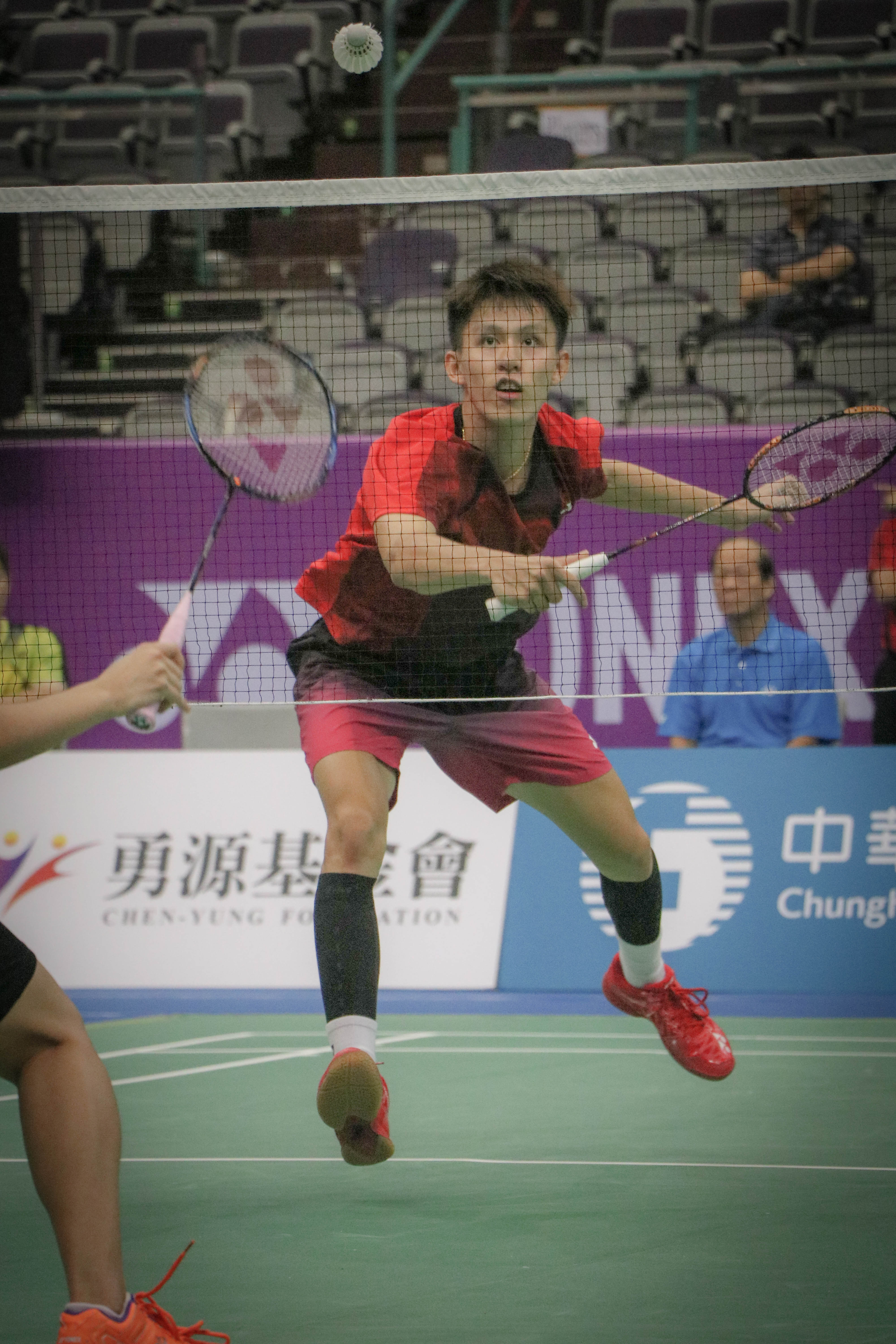 2018 台北OPEN 10/03